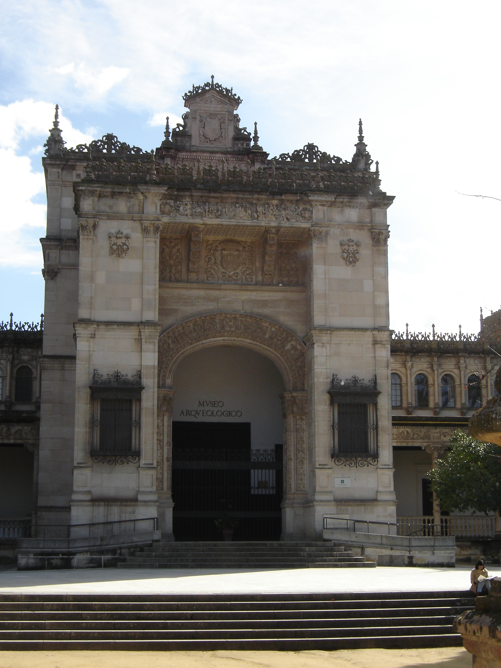 Museo Arqueológico (Plaza de América), en el Parque de María Luisa (Sevilla). Entrada al museo. Realización propia.